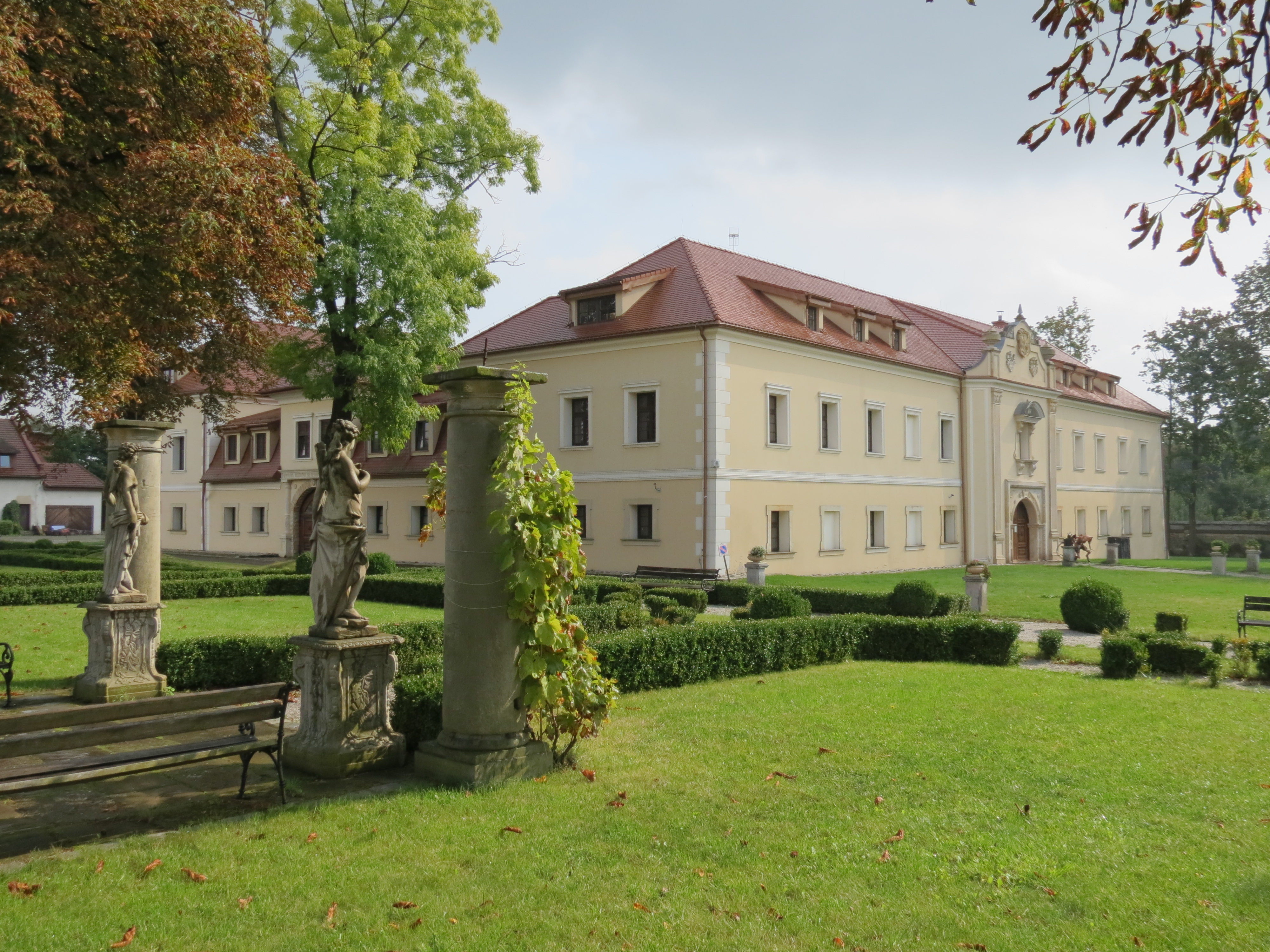 Tarnowskie Góry, park, XVI w.